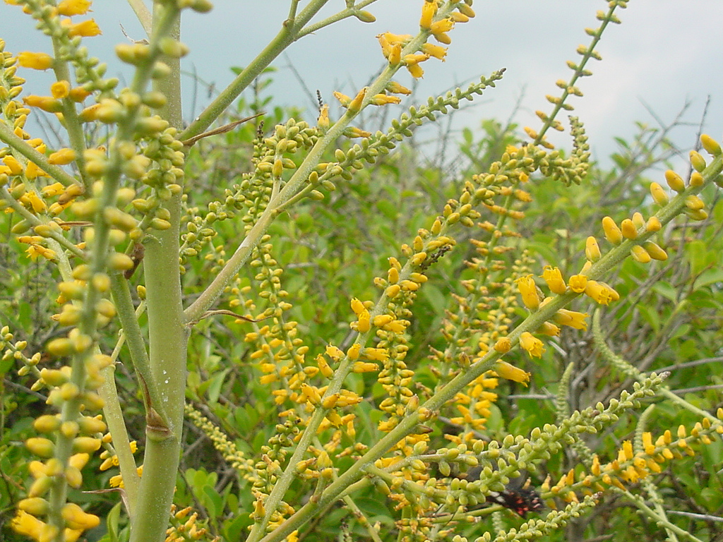 Dyckia maritima - BROMELIACEAE - Torres - RS - Brasil.